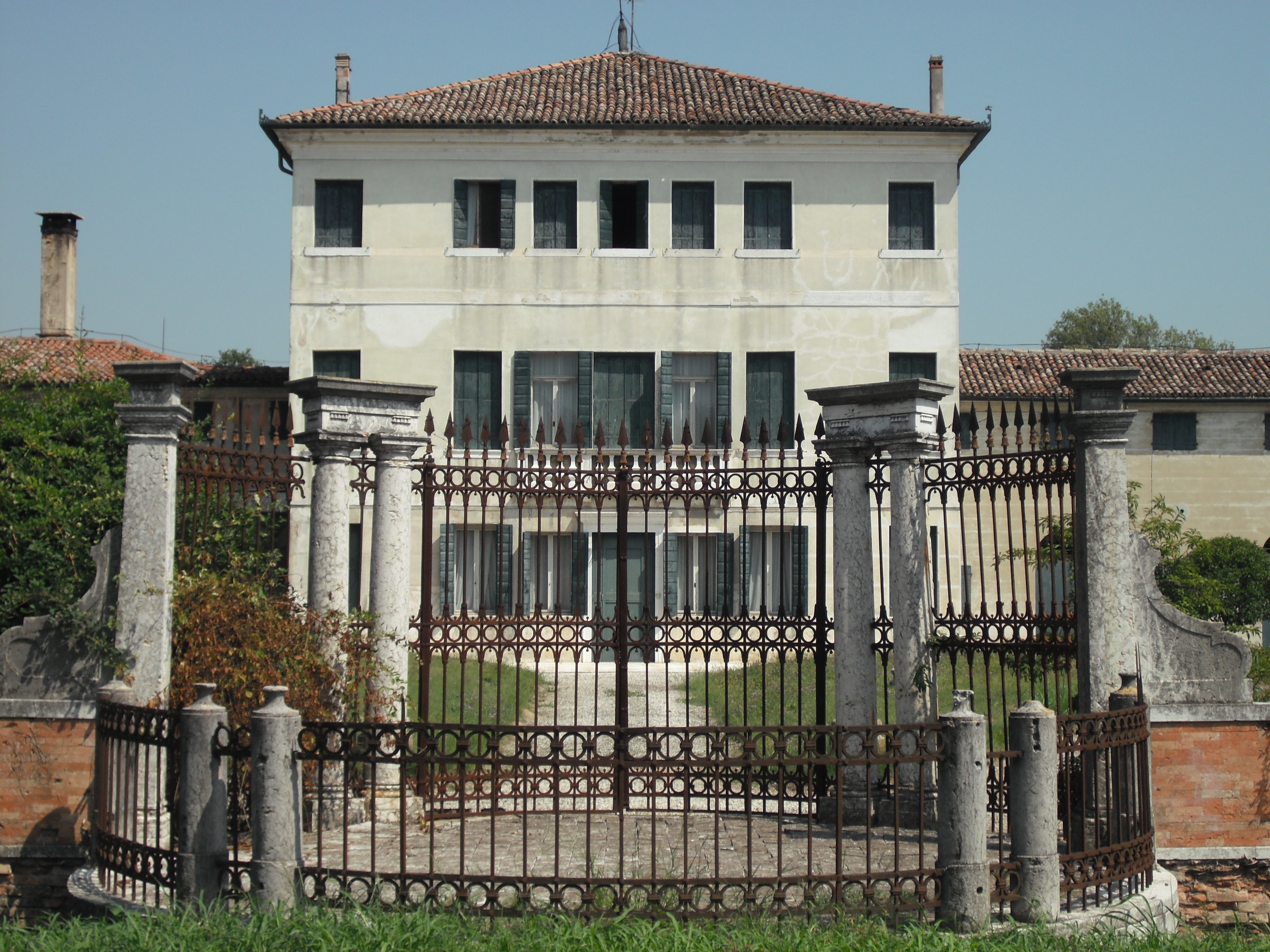 Villa Marchesi a Mogliano Veneto.